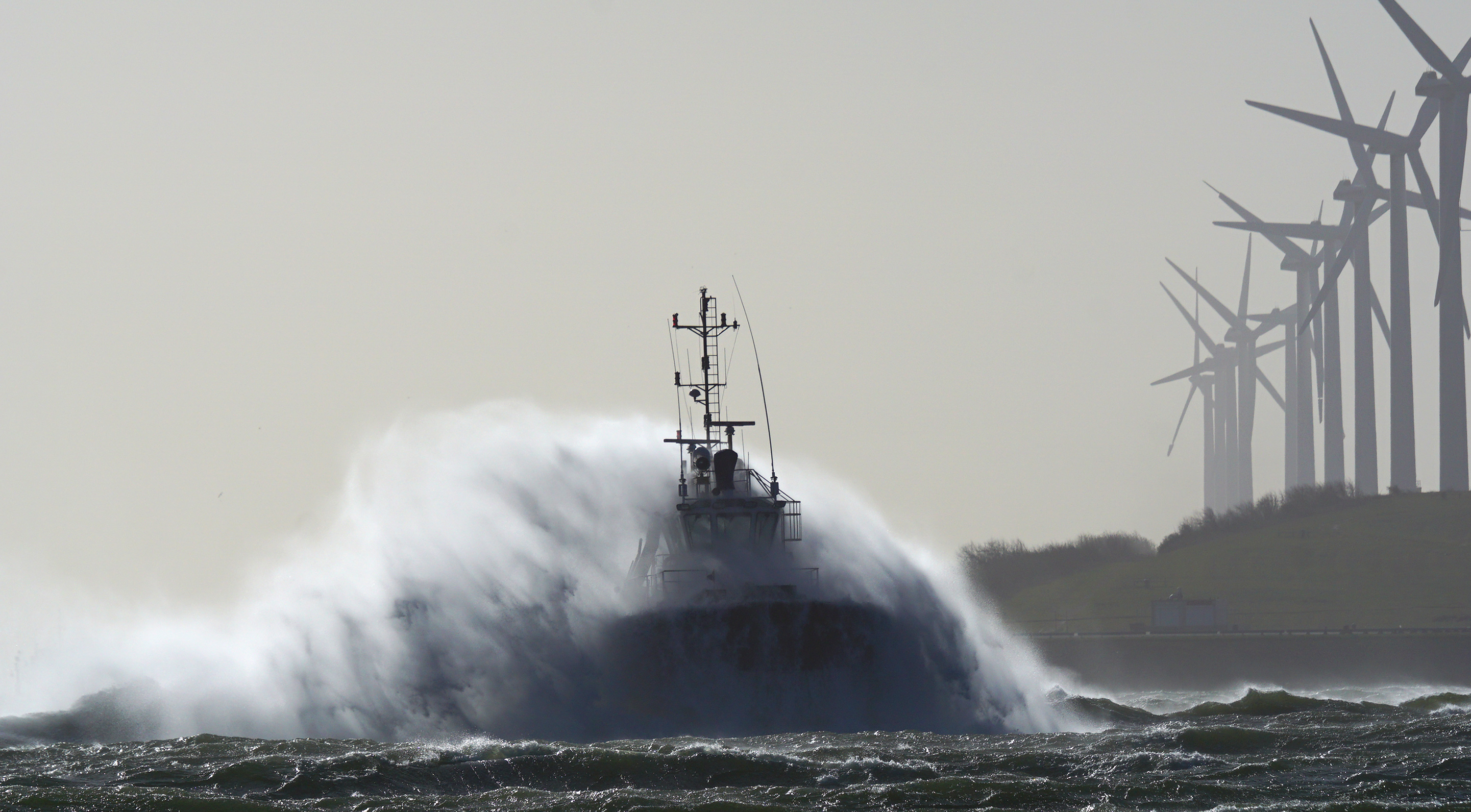 Nieuwe Waterweg 31-3-2015